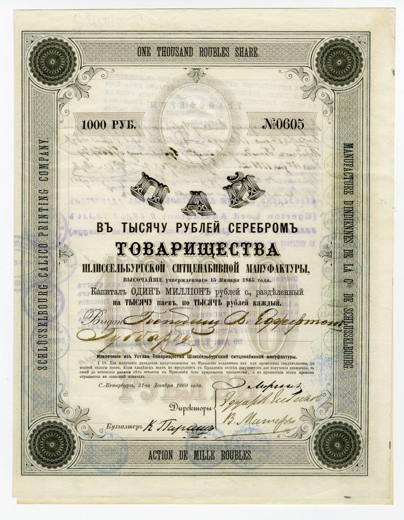 Пай именной в 1000 руб. серебром Товарищества Шлиссельбургской ситценабивной мануфактуры. С.-Петербург, 1869 г.